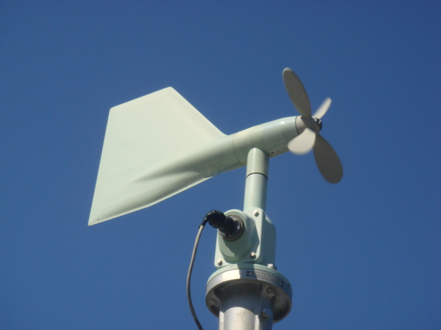 風向や風速を同時に計測するためのセンサー